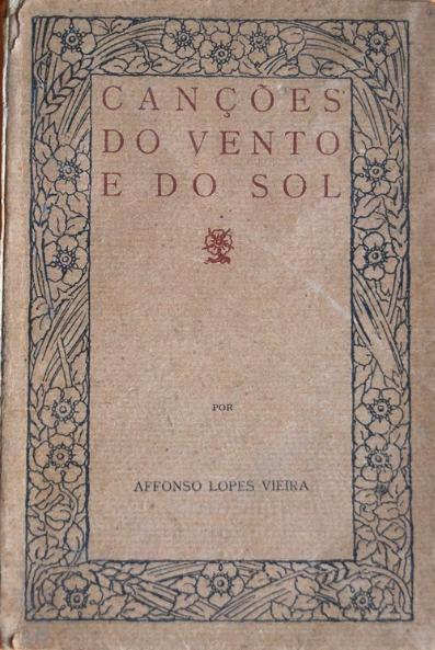 Couverture de la première édition des Canções do Vento e do Sol, d'Afonso Lopes Vieira. Vendu sur le site Companhia dos Livros.